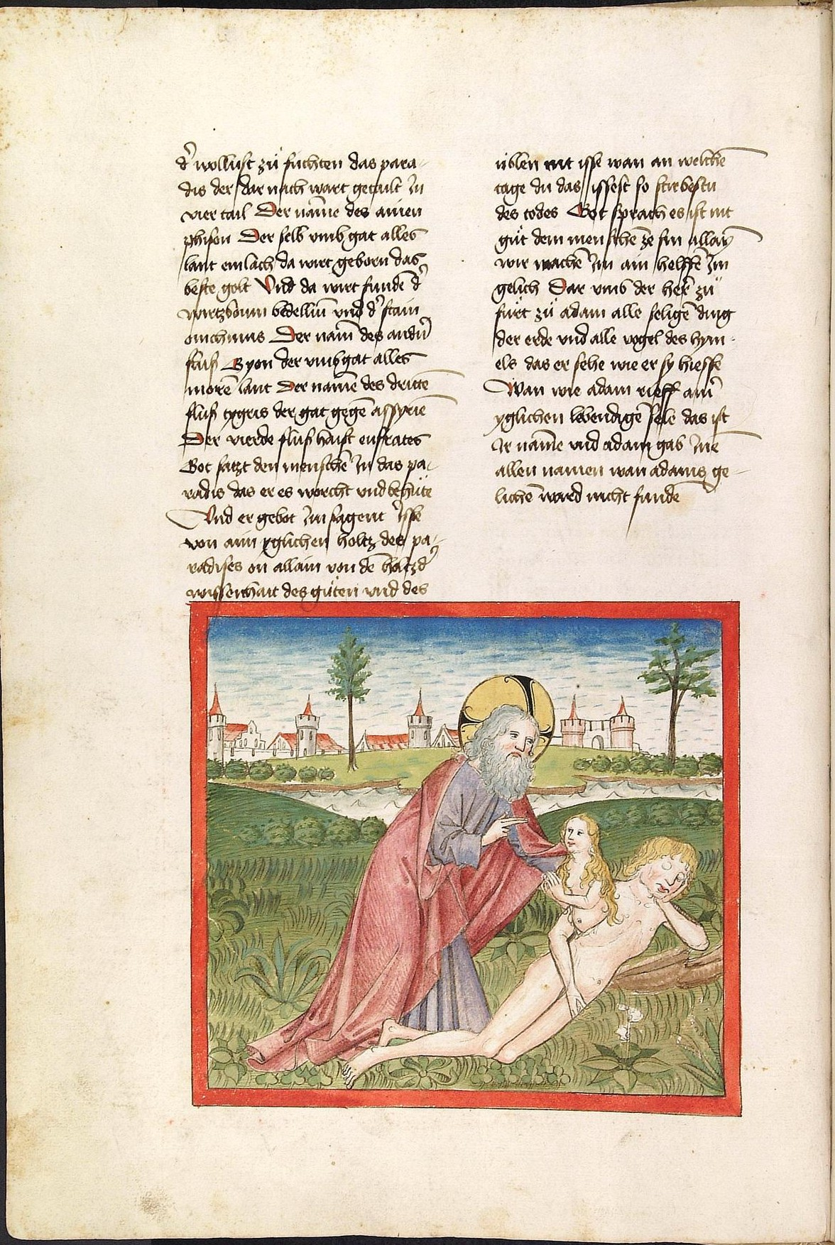 Codex Palatinus germanicus 16, Blatt 11v - Bibel, Altes Testament, Genesis: Gott erschafft Eva aus einer Rippe Adams. (Cpg 16 = Bibel AT, deutsch, Bücher Mose, Josua, Richter, Ruth)